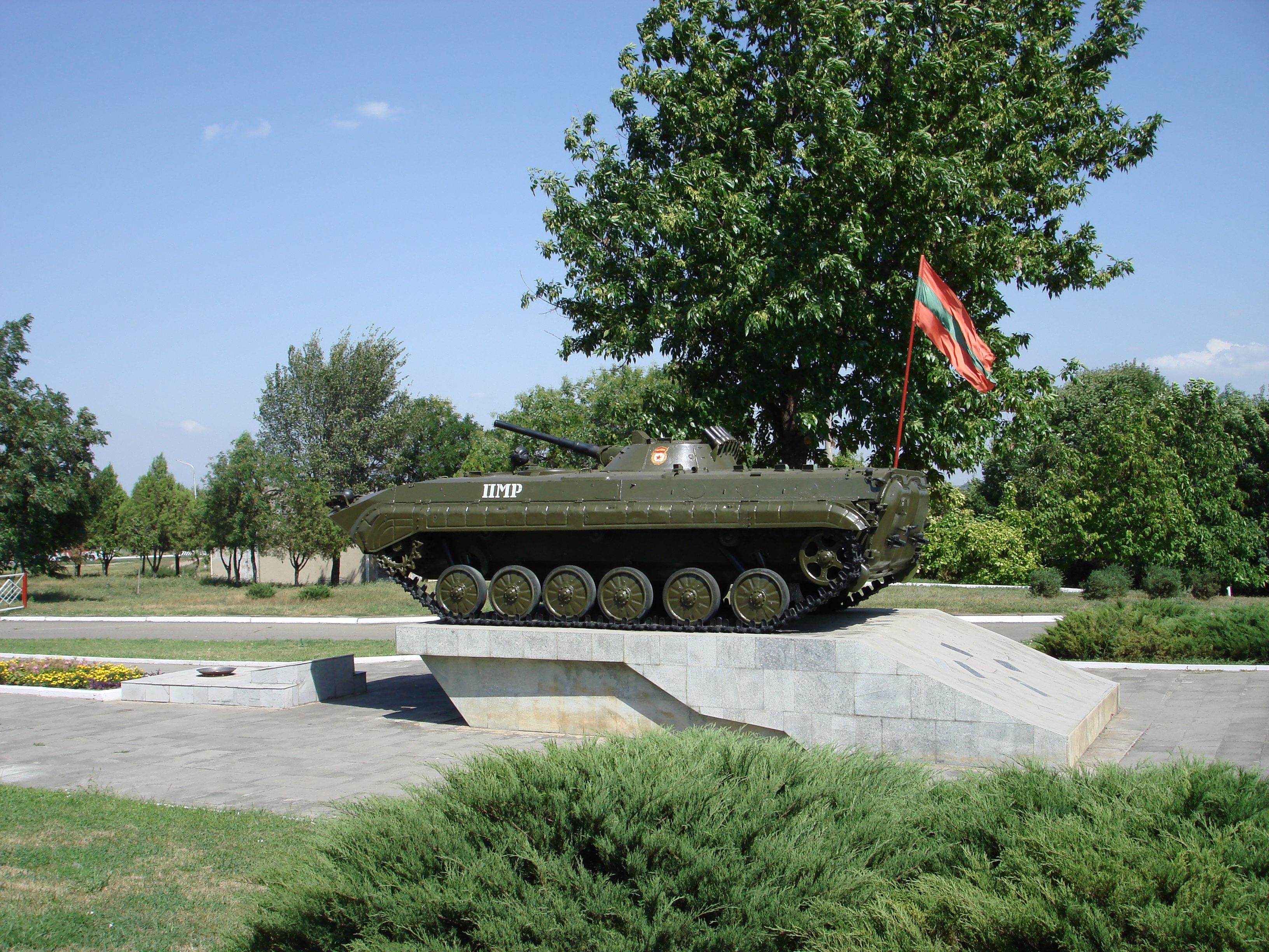 Мемориал Славы (Бендеры)